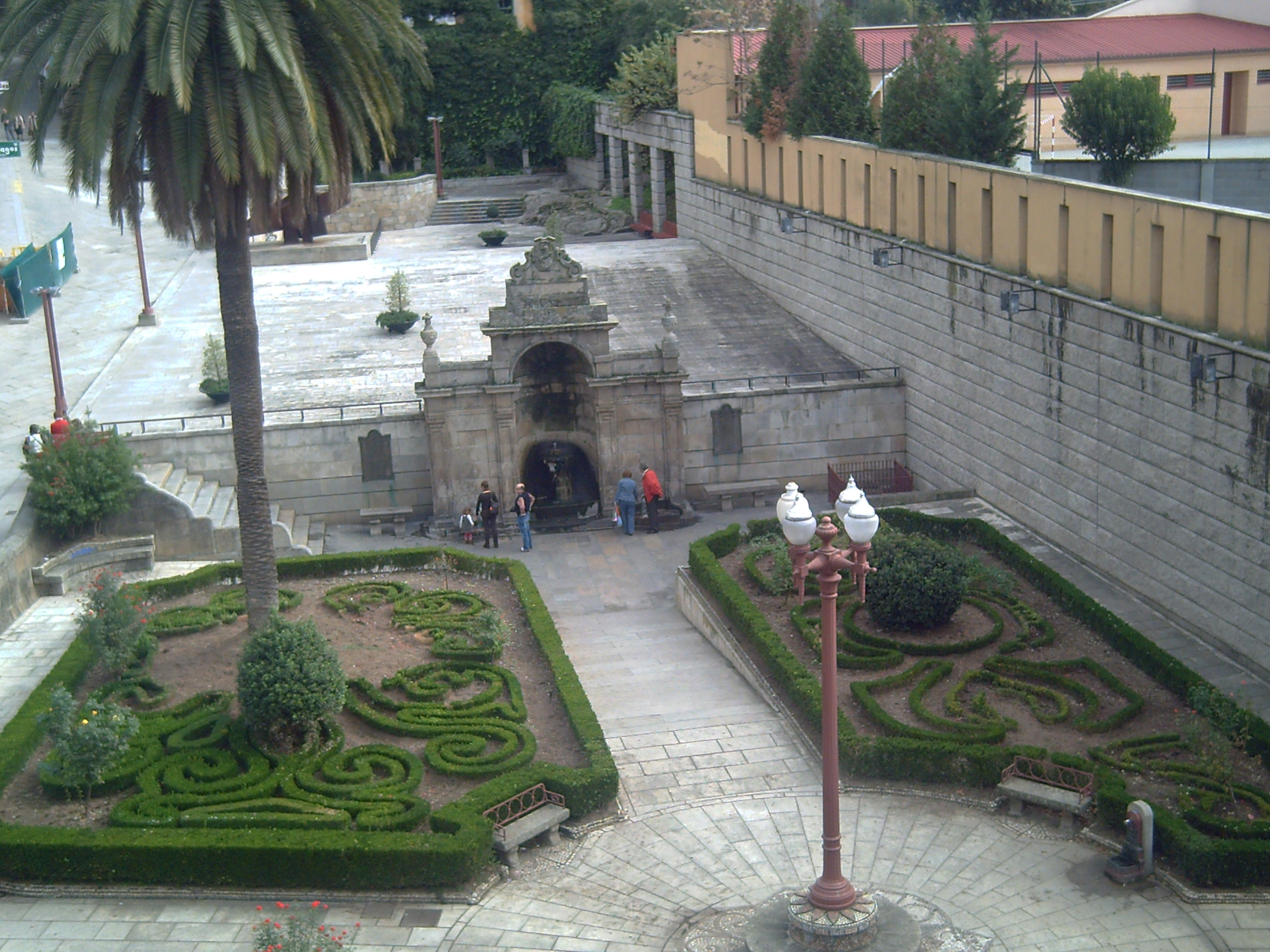 Xardíns das Burgas, (Ourense)